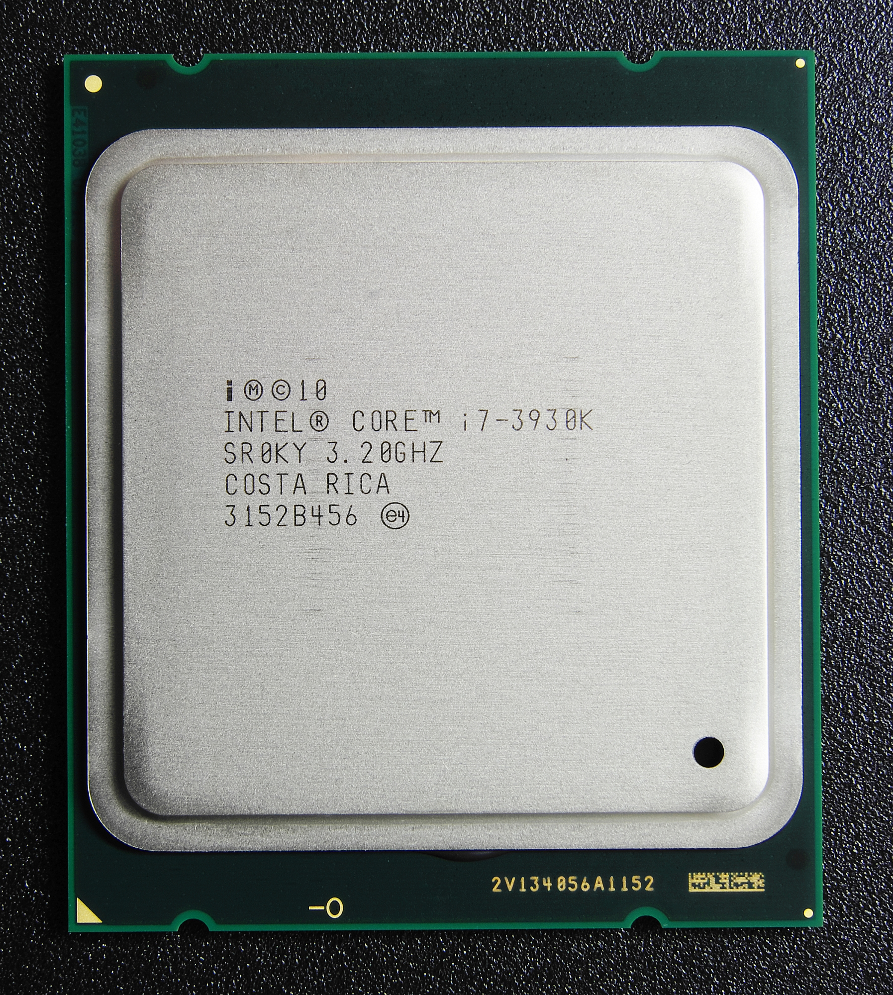 Intel Socket 2011